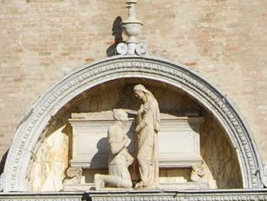 Tomba Cappello — Sant'Elena, Venezia. Foto personale